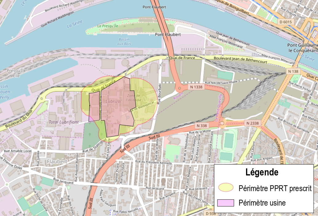 Carte du périmètre prescrit du PPRT de l’usine Lubrizol à Rouen (document non contractuel).